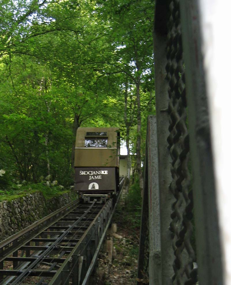 Funicular from Skocjan Caves